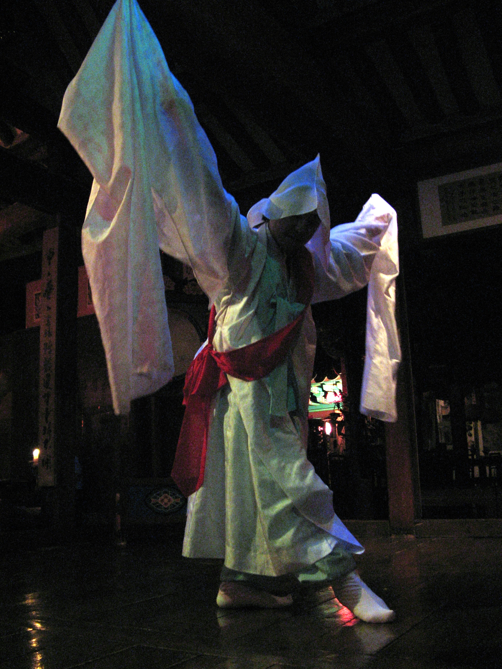 Seungmu, a Korean Buddhist dance